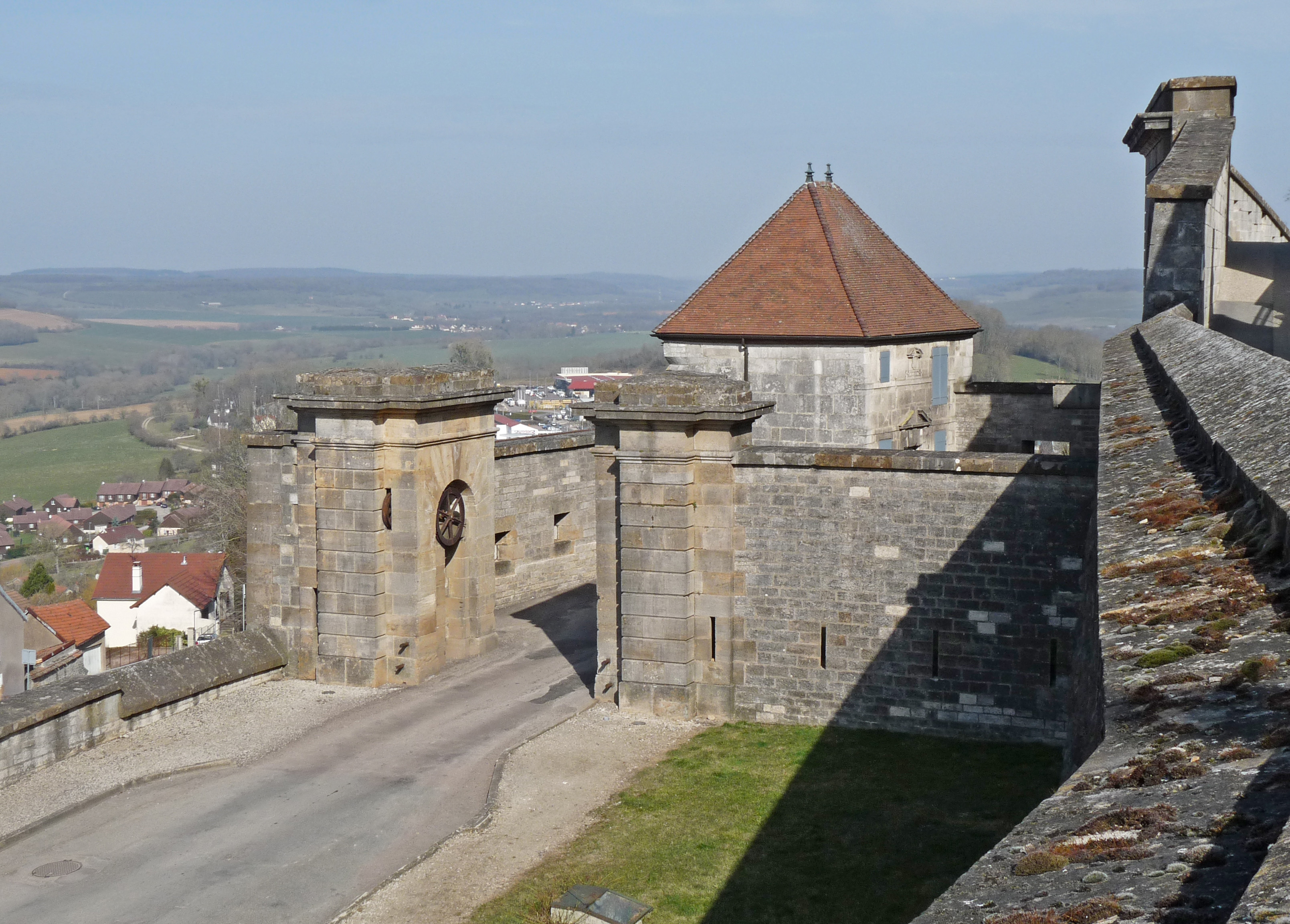 Porte de l'Hôtel de Ville ou du Marché à Langres (Haute-Marne). Modifiée au XVIe siècle et en 1854. Monument Historique.